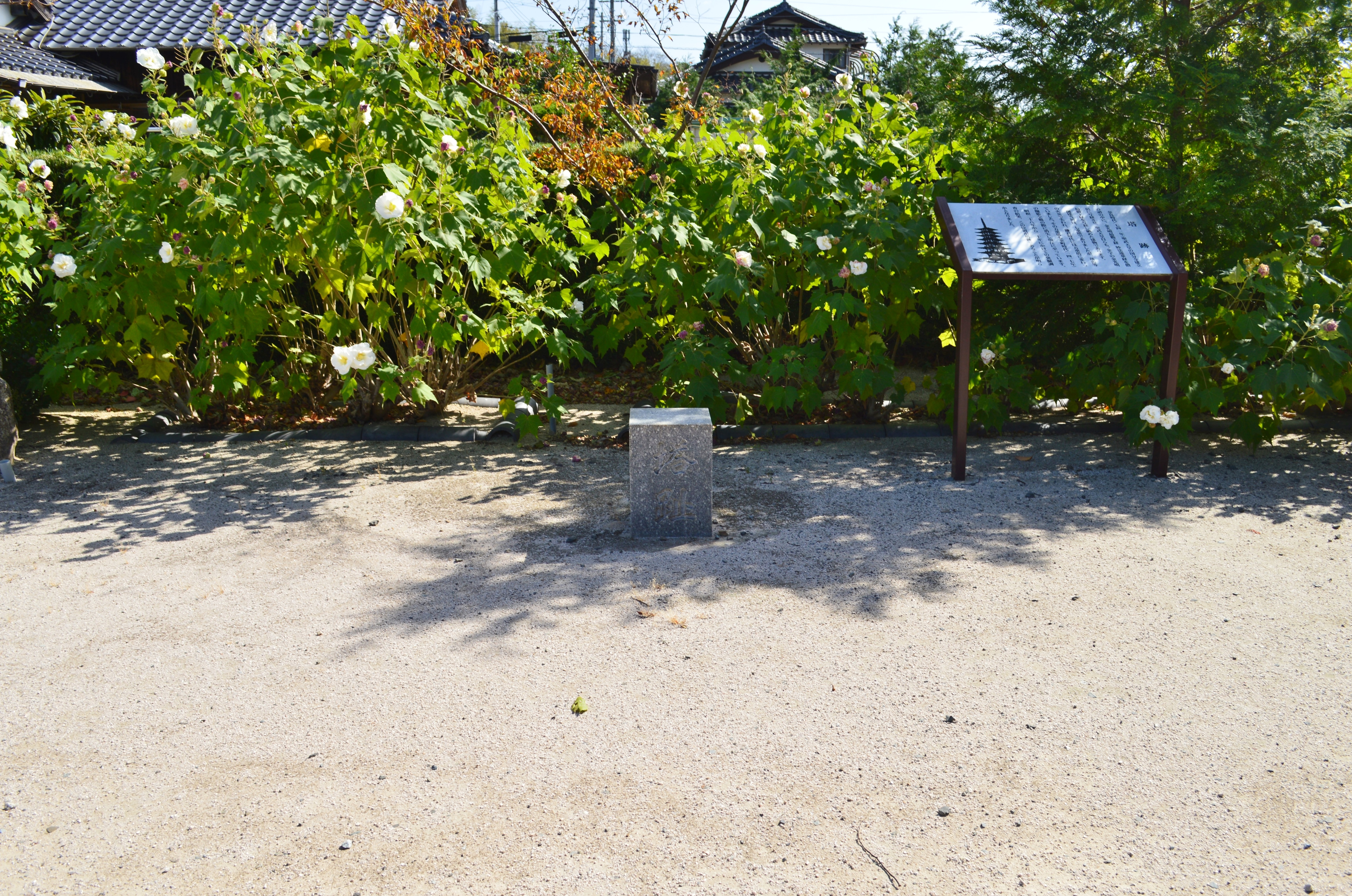 周防国分寺 塔跡